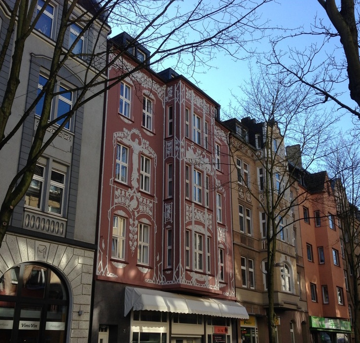 Schwanenhaus Kaiserstraße 73 This is a photograph of an architectural monument. 0677